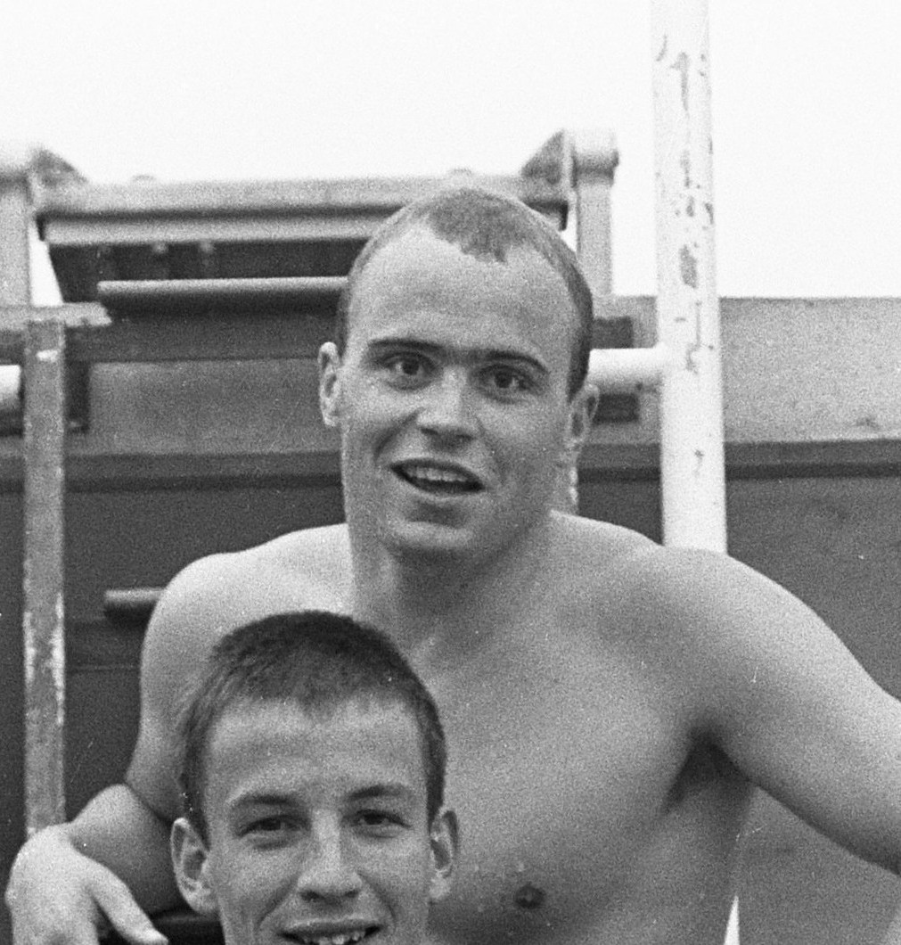 Estafettezwemmers als winnaars gehuldigd; Aad Oudt (top) en Elt Drenth This is an image from the Nationaal Archief, the Dutch National Archives, and Spaarnestad Photo, donated in the context of a partnership program.